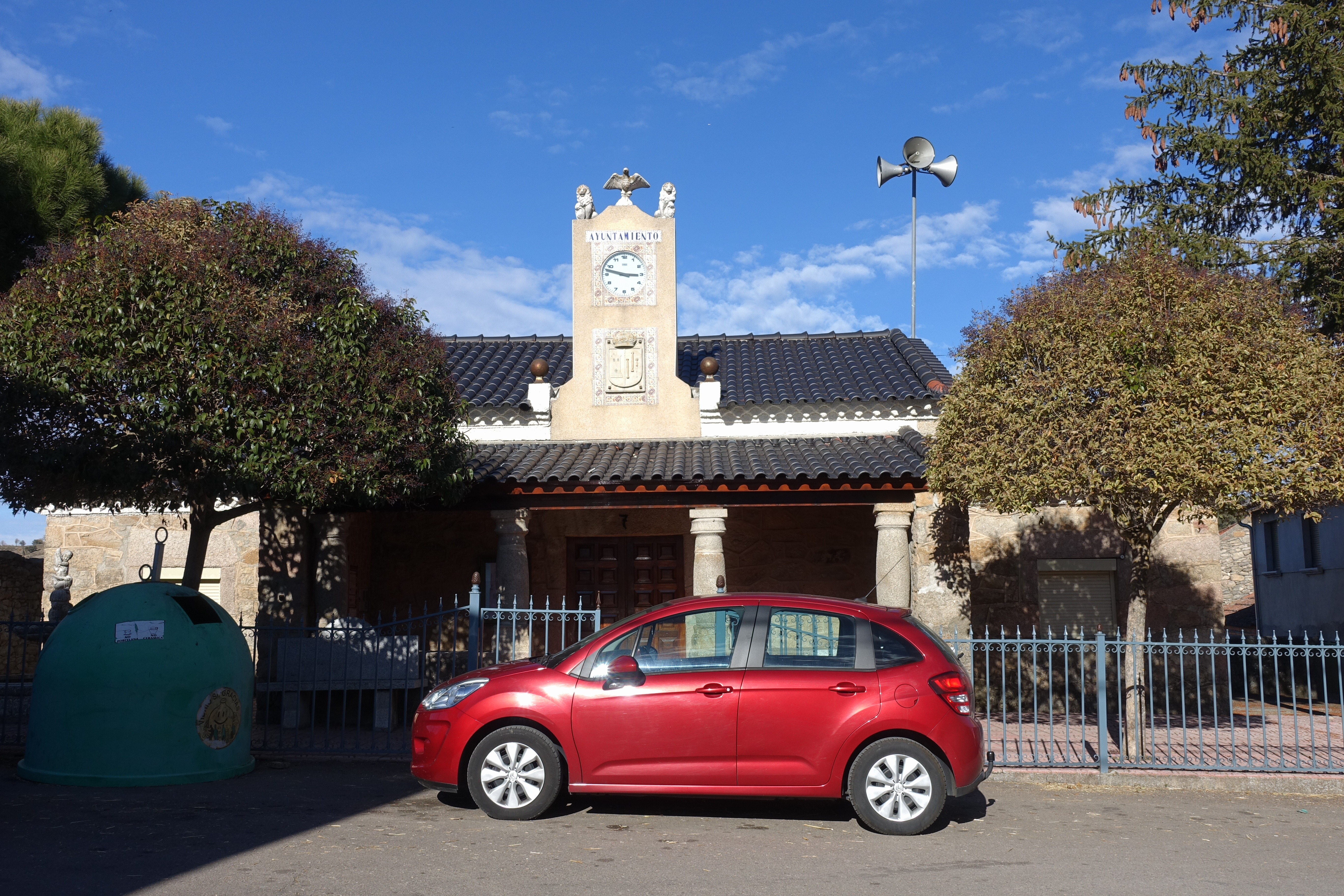 Casa consistorial de La Alamedilla (Salamanca, España).